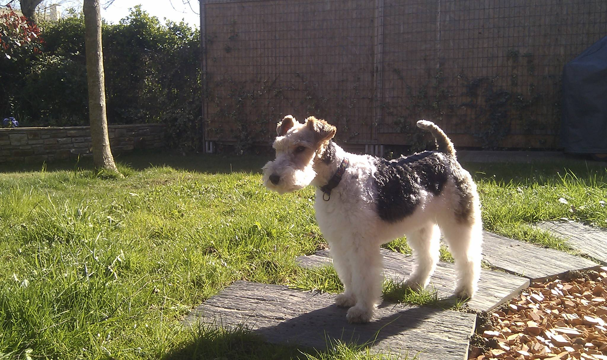 Femelle fox-terrier à poil dur